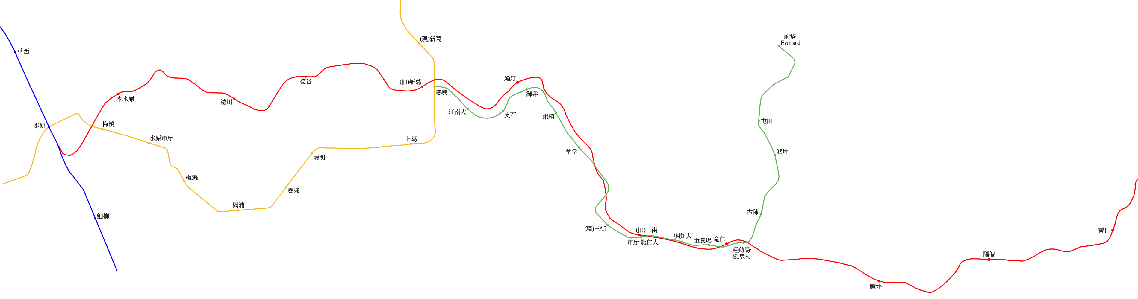 水驪線(水原・竜仁管内区間)と現存路線との位置関係。赤：水驪線、黄：盆唐・水仁線、緑：エバライン(竜仁LRT)、紺：京釜線